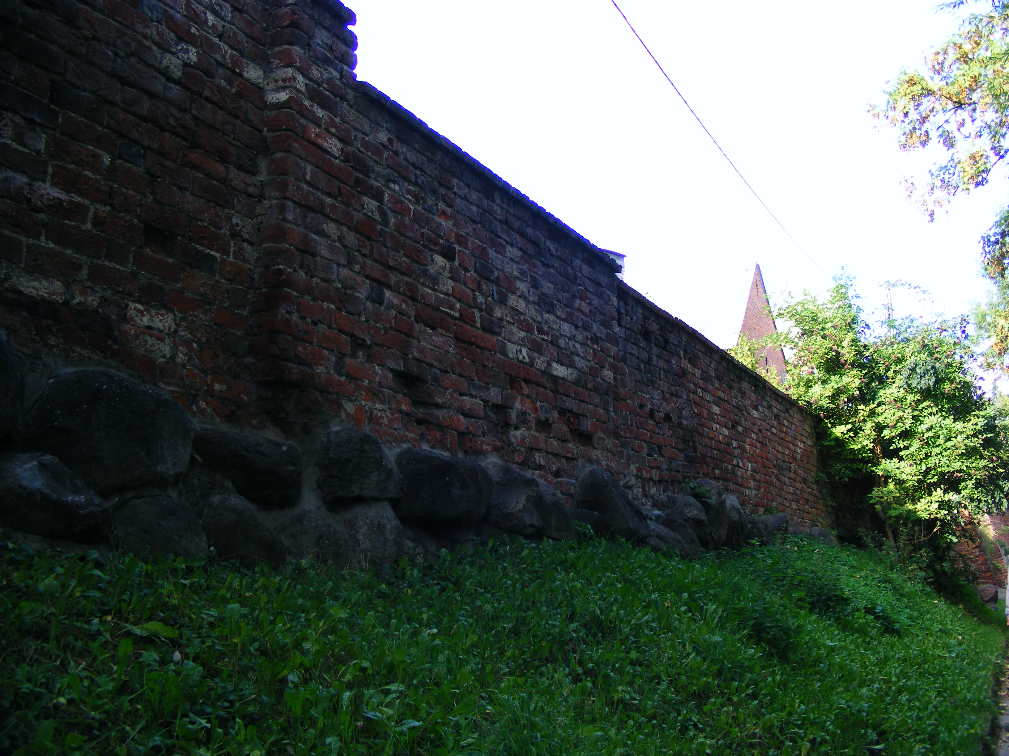 Mury obronne. Trzebiatów, ul. Wąska.